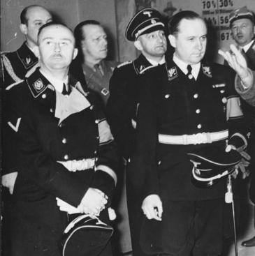 Auf der Grünen Woche 1939 Reichsminister Darré (Mitte), Polizeipräsident Graf Helldorf und Reichsführer SS Himmler beim Rundgang durch die gewaltige Schau. Ganz rechts der französische Botschafter Coulondre. Fot.: 27.1.39 Abgebildete Personen: (V.l.n.r.) Himmler, Heinrich: Reichsführer der SS, Deutschland (GND 11855123X) Darré, Richard Walther: Leiter Rasse- und Siedlungshauptamt, Reichsbauernführer, Deutschland (GND 118671030) Helldorff, Wolf Heinrich von Graf: Polizeipräsident von Berlin, Ritterkreuz (RK), Prozeß 20. Juli 1944, Deutschland (GND 119528789) Coulondre, Robert: Botschafter in Deutschland und der Sowjetunion, Frankreich (GND 124375065)